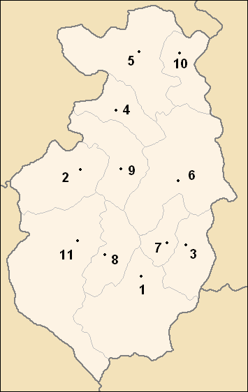 Sujet : carte des obchtini (municipalités) de l'oblast de Pazardjik, en Bulgarie Auteurs : Потребител:Ljubo (Любомир Таушанов = Lyoubomir Taouchanov), pour la version originale en bulgare, Utilisateur:Hégésippe Cormier, pour l'adaptation française (repères chiffrés) Source : Картинка:Pazardzik Oblast map.PNG (22 mai 2005) Licence